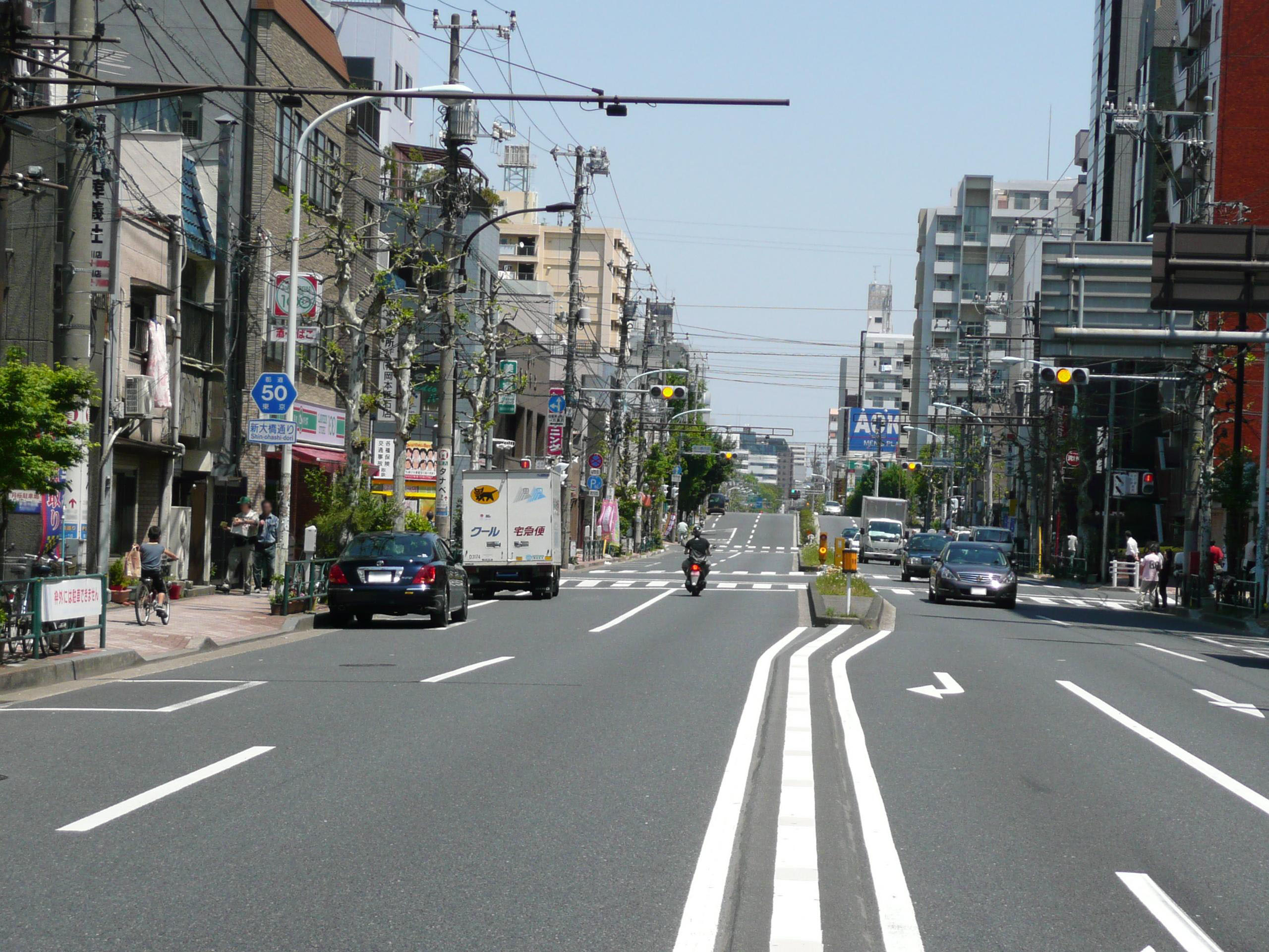 東京都道50号東京市川線江東区大島駅付近